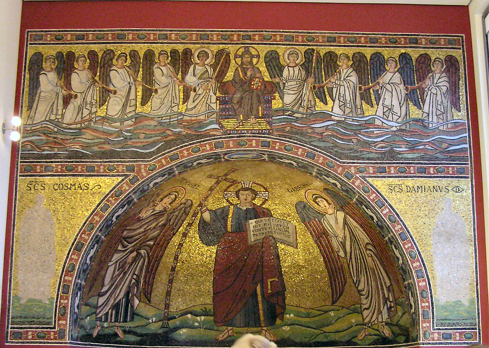 Mosaik aus Ravenna, (Berlin, Bodemuseum): Christus Victor mit Erzengeln Michael und Gabriel; Museum für Byzantinische Kunst, Bode-Museum, Berlin.